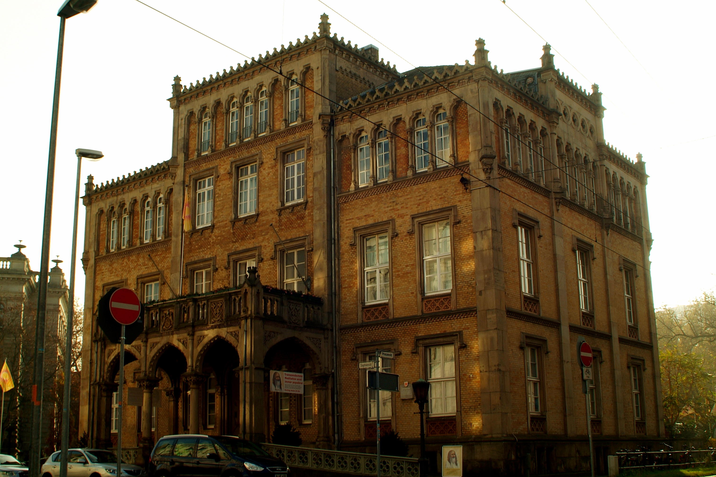 Das Palais Grote (unter der heutigen Adresse Sophienstraße 7, im Dreieck Prinzenstraße/Schiffgraben) in Hannover errichtete der Architekt Otto Goetze 1862 - 64 für Graf Adolf von Grote. Das Gebäude dient seit 2005 als "Maharishi Friedenspalast Hannover".